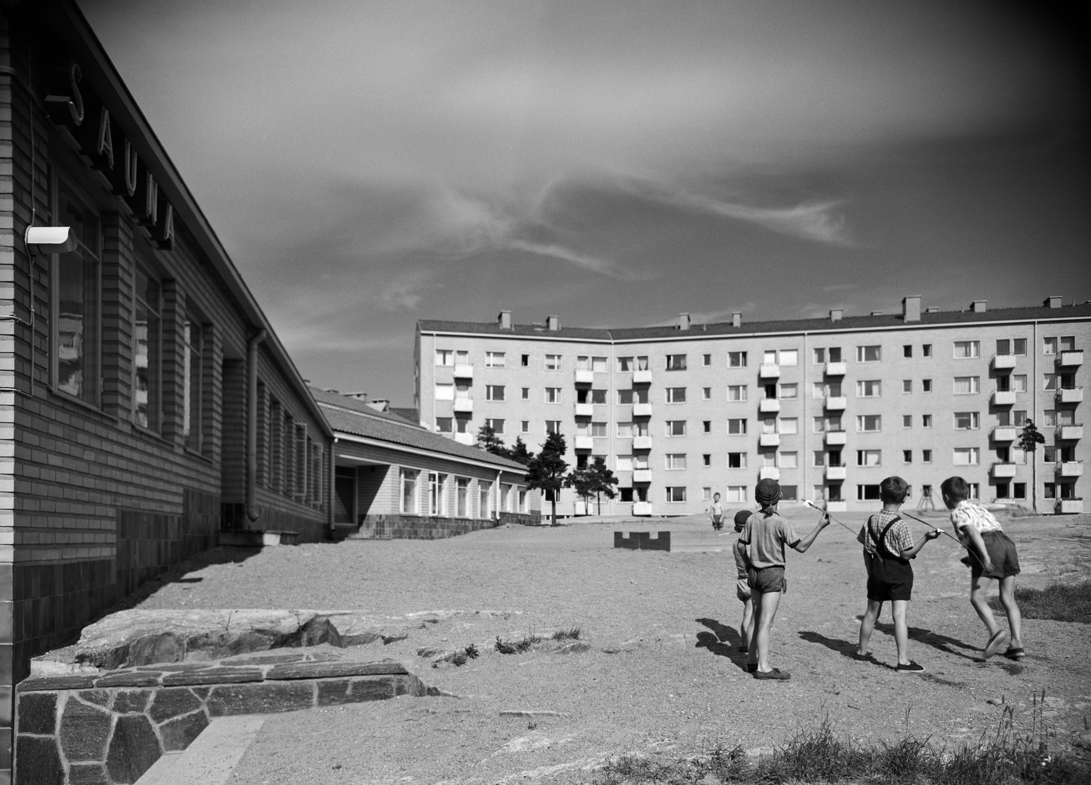 Asuntoyhteistalo Oy. Rakennuksen on suunnitellut Olli Saijonmaa, valmistunut 1953. Pojat leikkivät keihäänheittoa rakennuksen pihalla. Kuva on otettu pihan pohjoisosasta koilliseen päin.